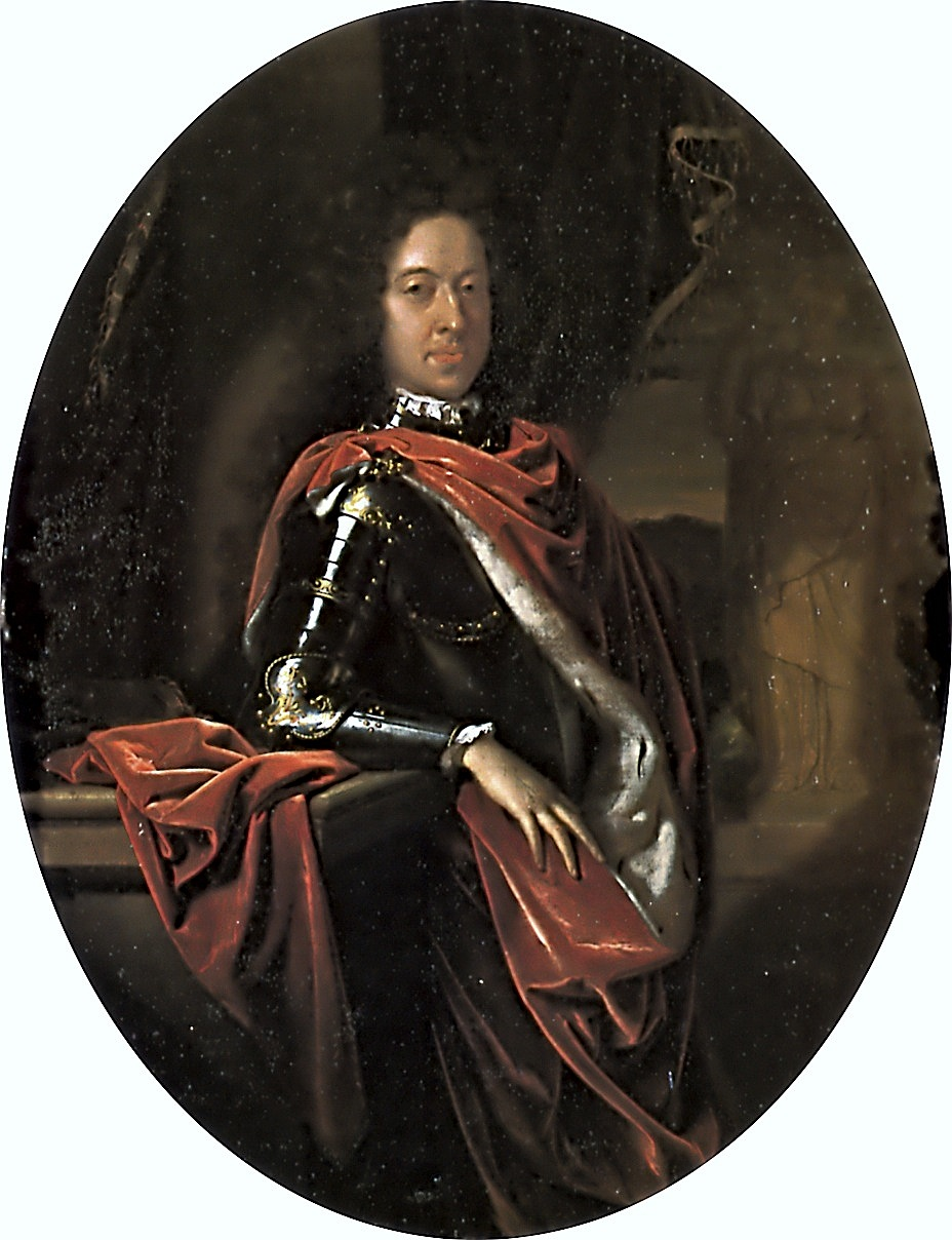 Questo ritratto di Gian Gastone de' Medici fu commissionato al pittore olandese Adriaen van der Werff dal cognato del principe, l'elettore palatino del Reno Giovanni Guglielmo, nel luglio del 1698, trovandosi contemporanemante il ritrattato e il ritrattista per un breve periodo a Düsseldorf. In una lettera al padre Cosimo III, granduca di Toscana, datata 26 luglio 1698, il principe lamentò il tedio di dover posare per tre giorni per farsi ritrarre il viso, essendo il pittore «un po' stitico e agiato» (cioè lento e che se la prendeva con comodo). In un'altra lettera, scritta nello stesso giorno, Anna Maria Luisa, sorella di Gian Gastone e moglie dell'elettore palatino, scriveva allo zio: «Gio[van] Gastone si dipinge non dirò con suo sommo gusto ma bensì dell'Elettore, che l'[h]a volsuto essendoci un pittore bravo d'Olanda, e siamo qui nella sua camera a tenerlo allegro». Il dipinto fu completato soltanto sette anni dopo, nel 1704.